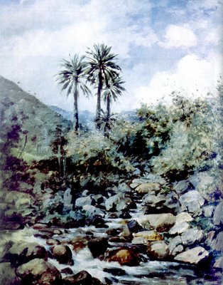 Palmiers à Ocoa